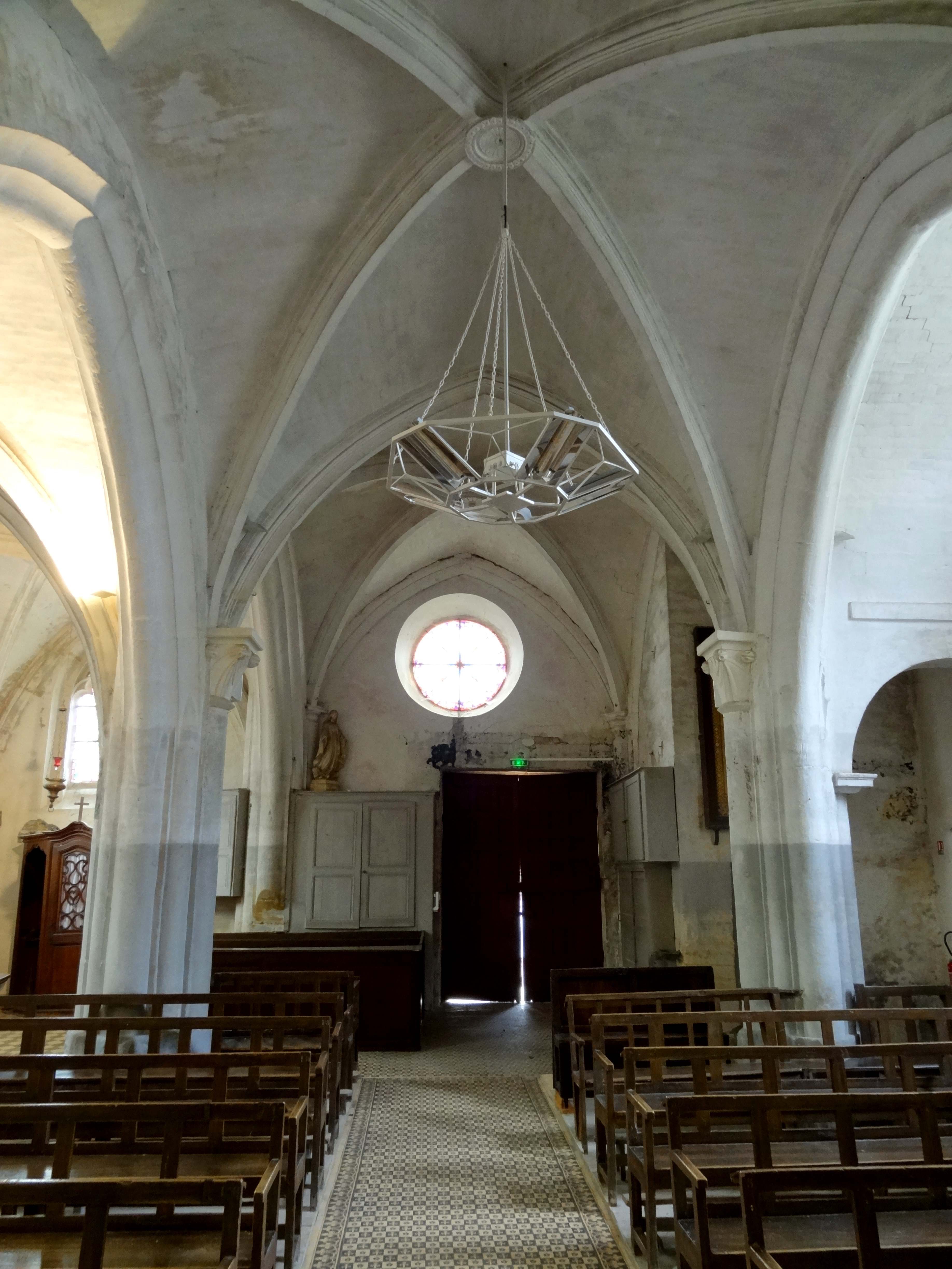 Intérieur de l'église - voir titre.